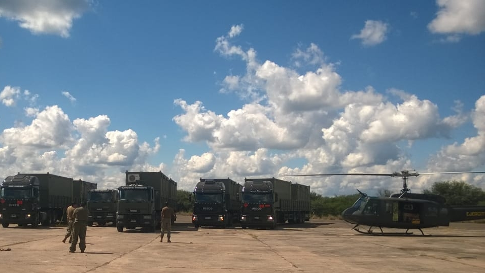 Despliegue del Ejército Argentino en la Operación Integración Norte iniciada en 2018